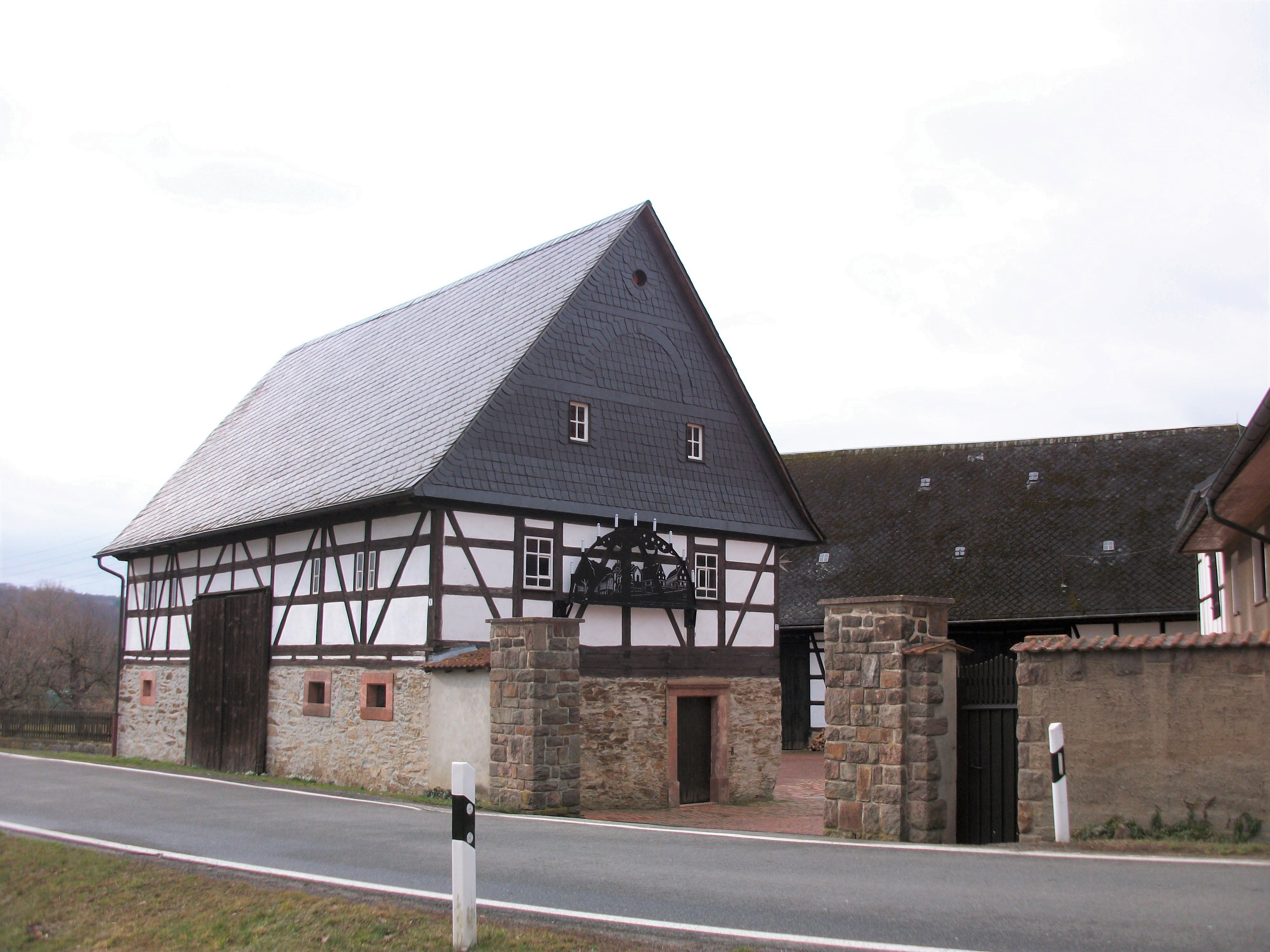 Schlagwitz, Bachstraße 9